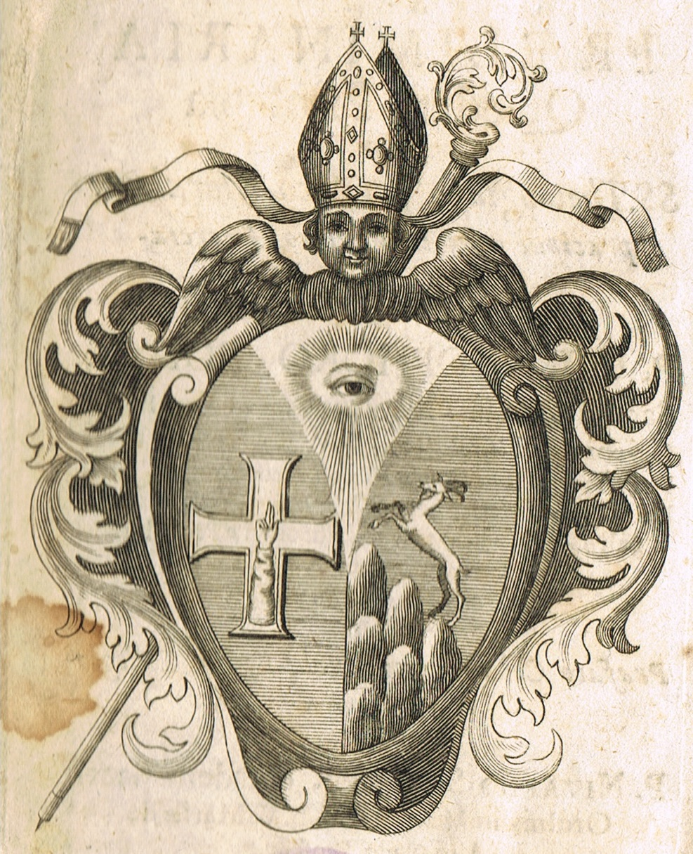 Gerhard Weixelberger war Abt des Stiftes Heiligenkreuz bei Wien. Das Wappen kommt aus einem 1710 veröffentlichten theologischen Lehrbuch von Böhm: Institutiones seu Praeliminaria.